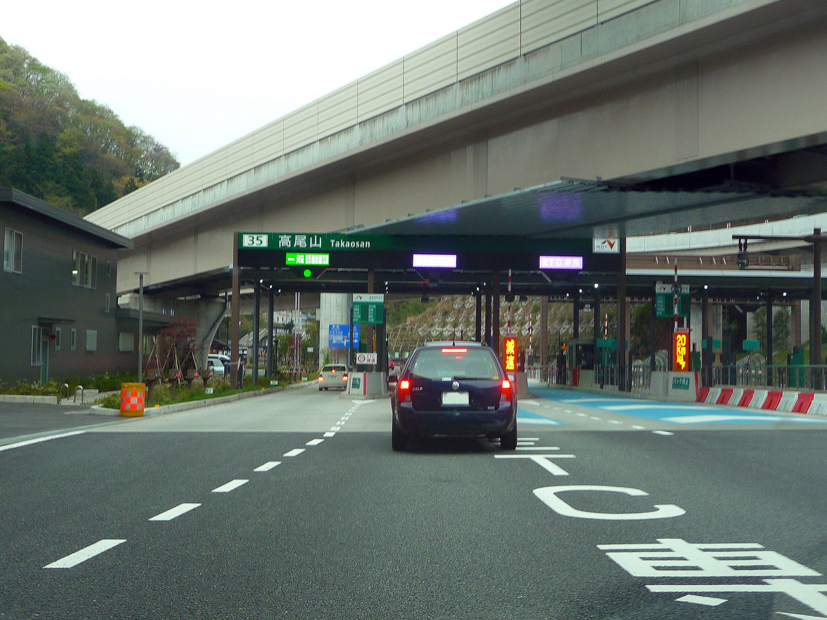 圏央道高尾山インターチェンジ